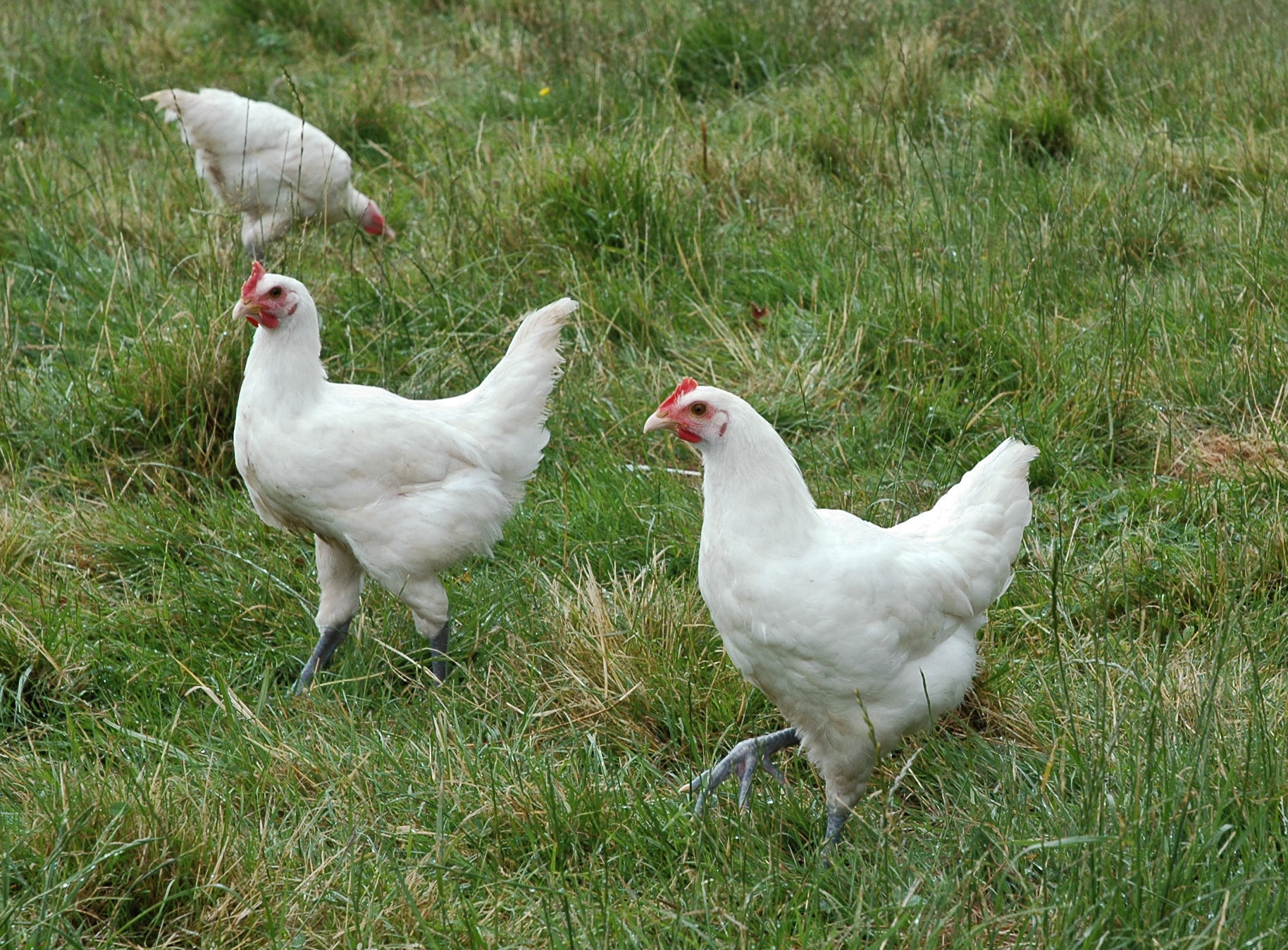 Bressehühner